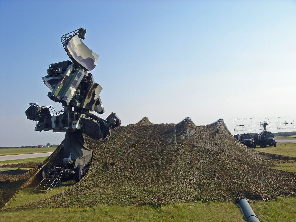 radar, Neva 1, anti aircraft rocket system